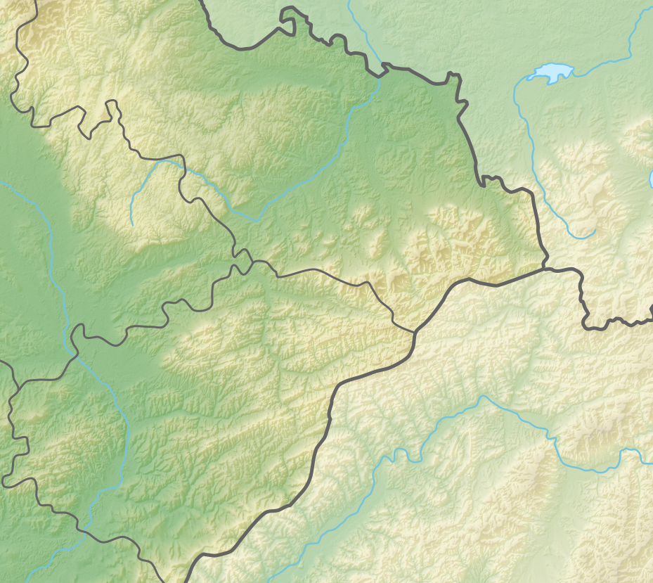 Reliefkarte Tschechien Topographischer Hintergrund: NASA Shuttle Radar Topography Mission (public domain). SRTM3 v.2.